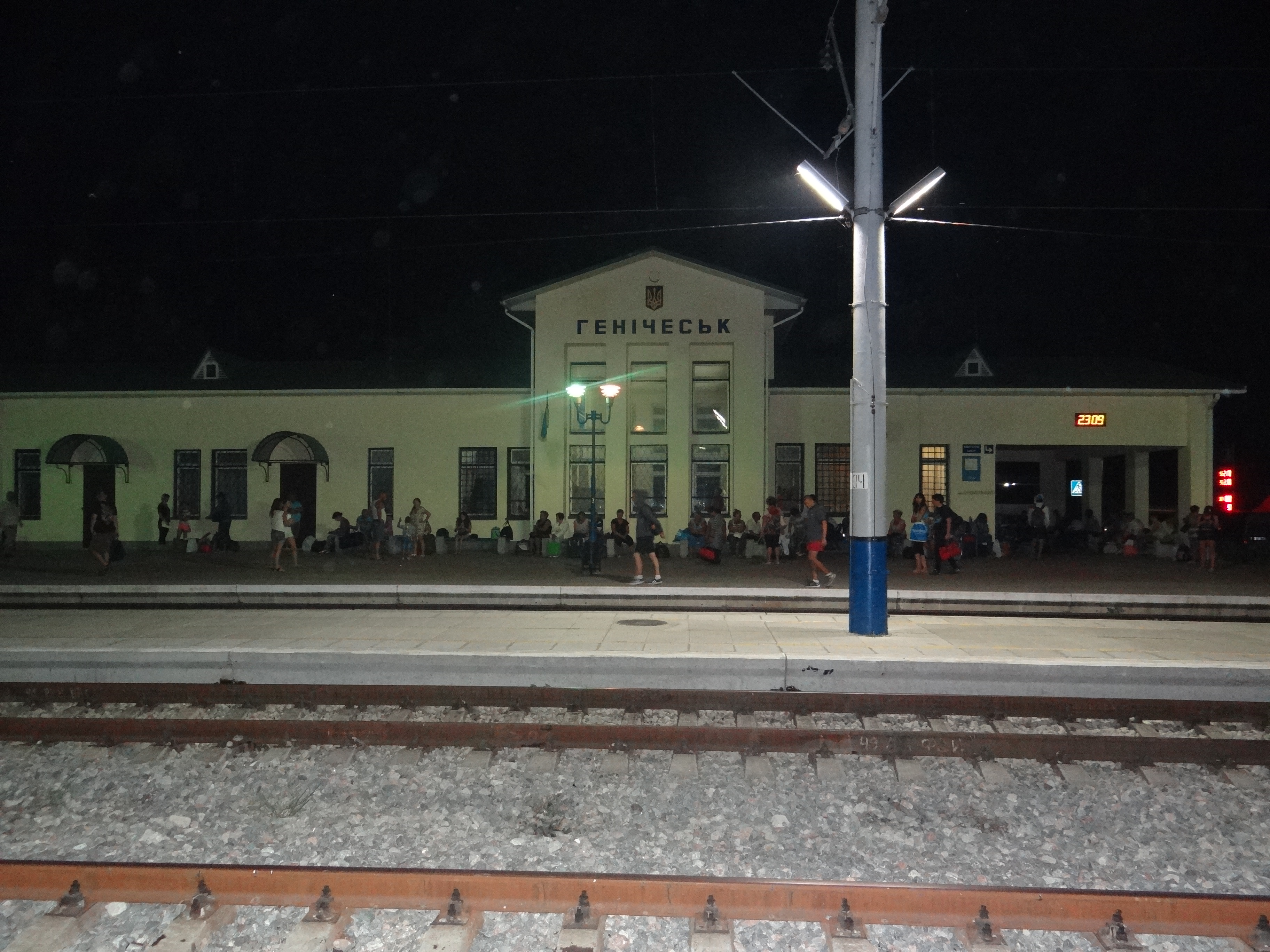 Генічеськ